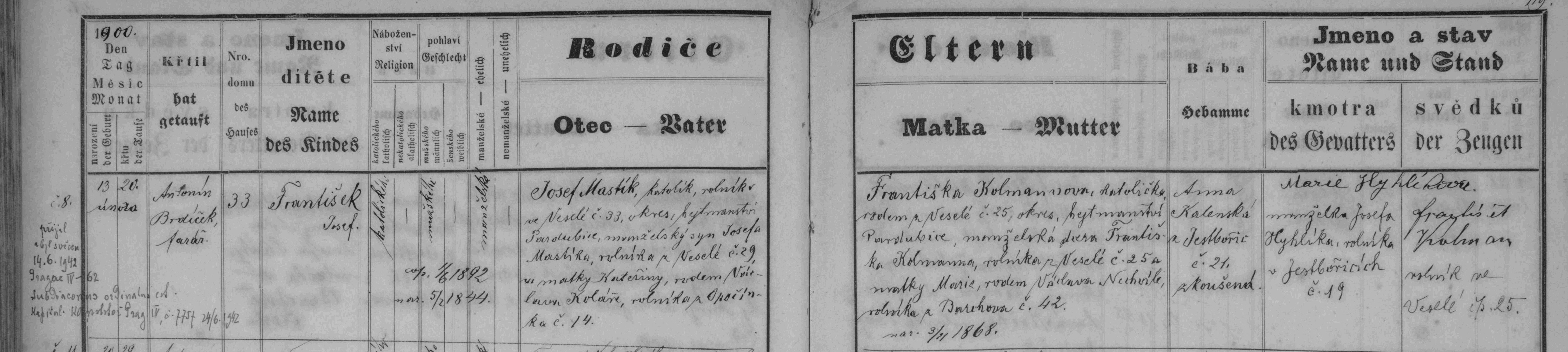 matriční zápis o narození Františeka Mastíka (Chrysostom František Mastík) , matrika N 1867-1908 Barchov + Veselá (SOA Zámrsk)